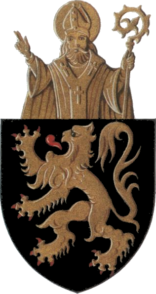 Wapenschild van Kapelle-op-den-Bos